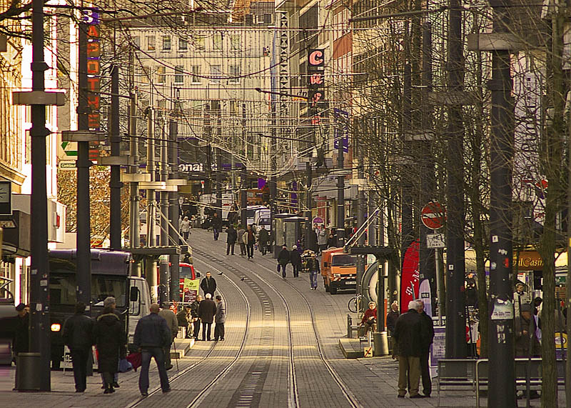 Witten, Innenstadt, Bahnhofstraße (Fußgängerzone), mit Weihnachtsbeleuchtung (!).